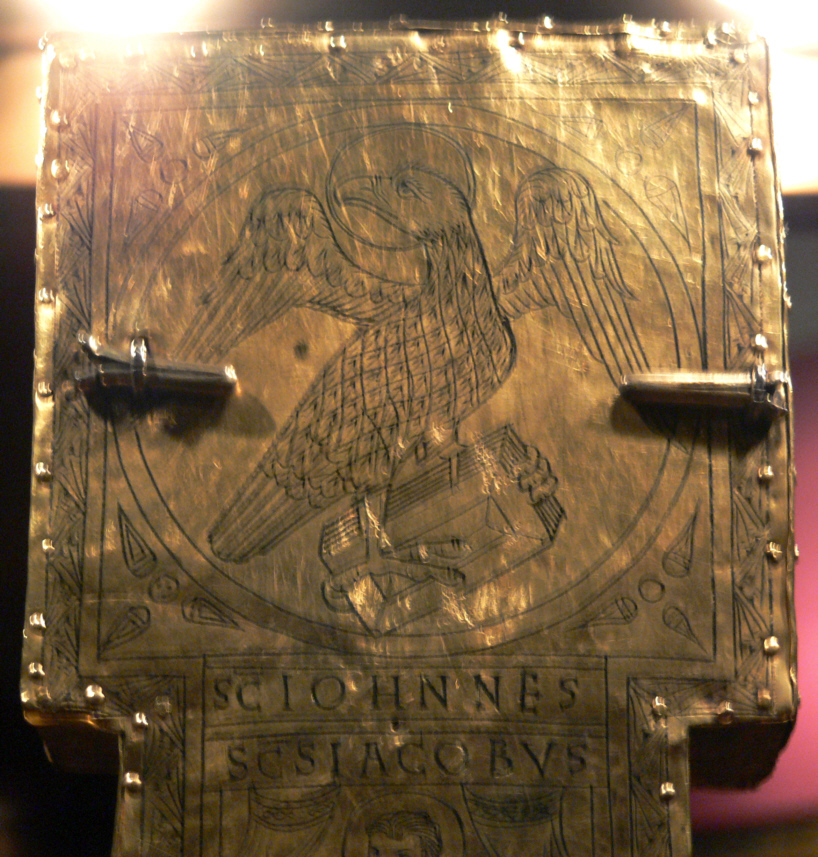 Das Reichskreuz; westdeutsch, um 1024/1025; Wien, Weltliche Schatzkammer; SK Inv.-Nr. XIII 21 Rückseite, oberer Kreuzarm